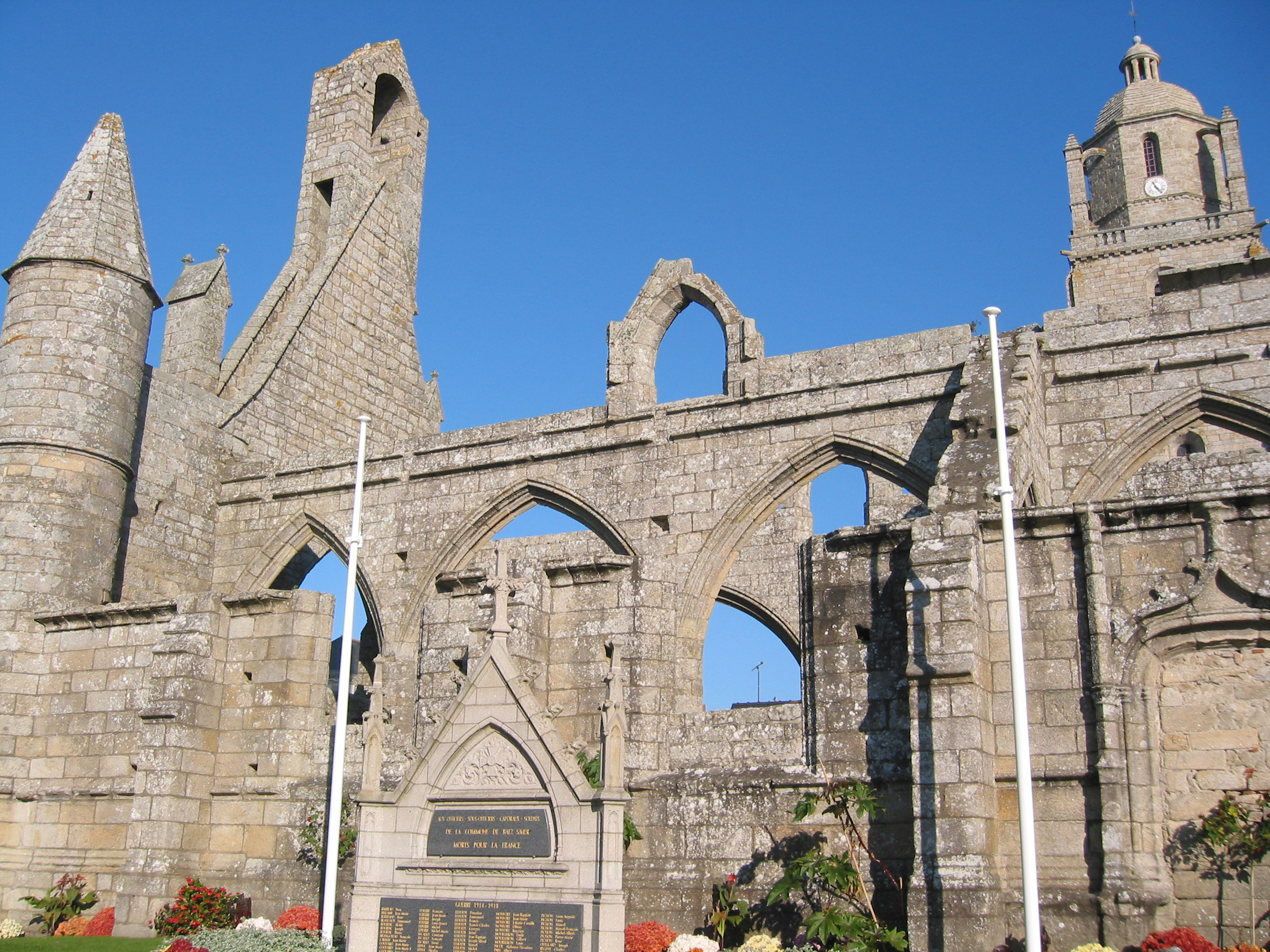 Batz sur Mer, la Chapelle du Murié, Photo prise par Harrieta171 le 25/11/04